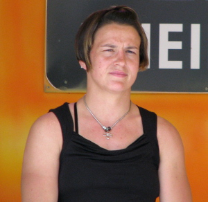 Alexandra Engelhardt beim Empfang der Olympia-Teilnehmer des Teams London der Metropolregion Rhein-Neckar 2012.